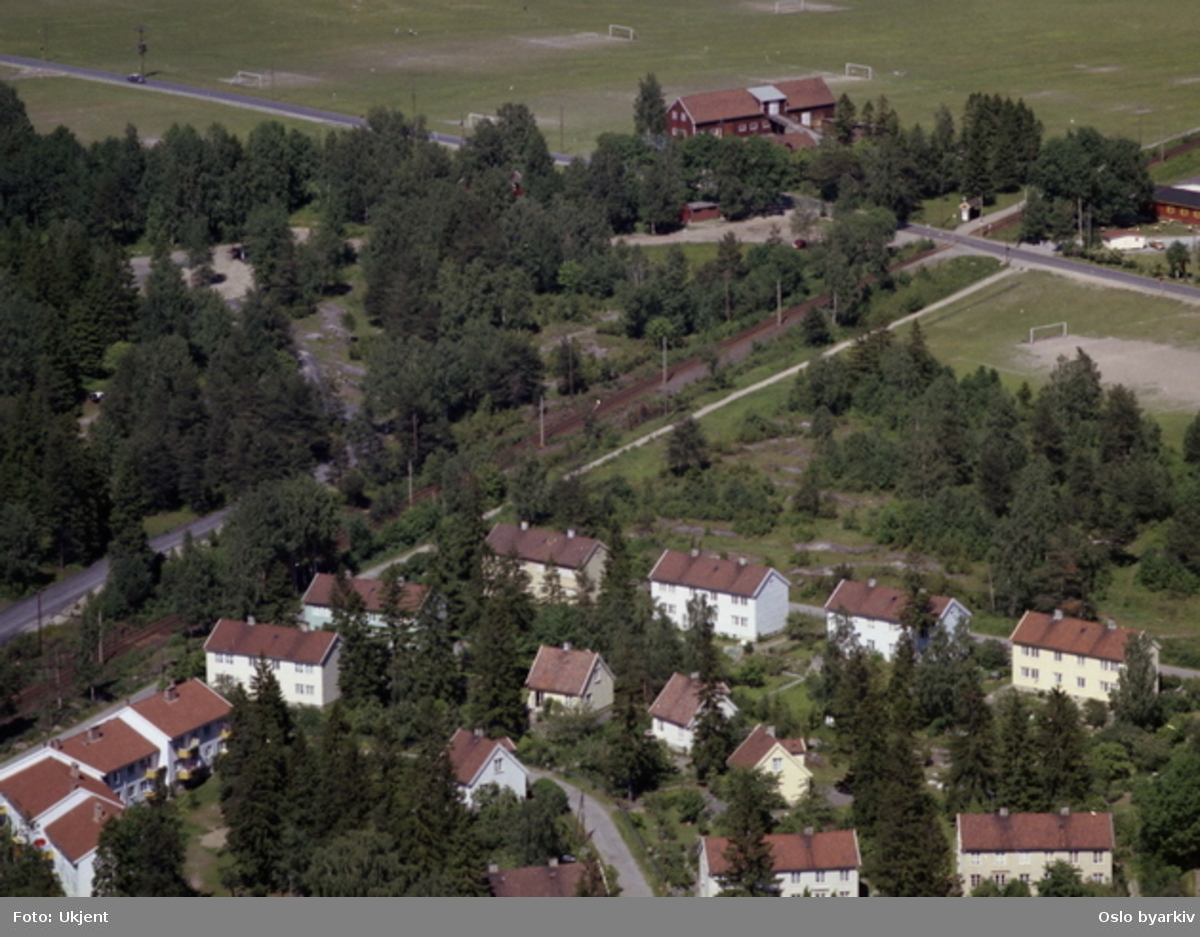 Ekebergbanens Simensbråtenlinje krysser Ekebergveien ved Smedtua.